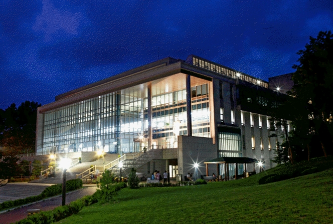 한림대학교 도서관